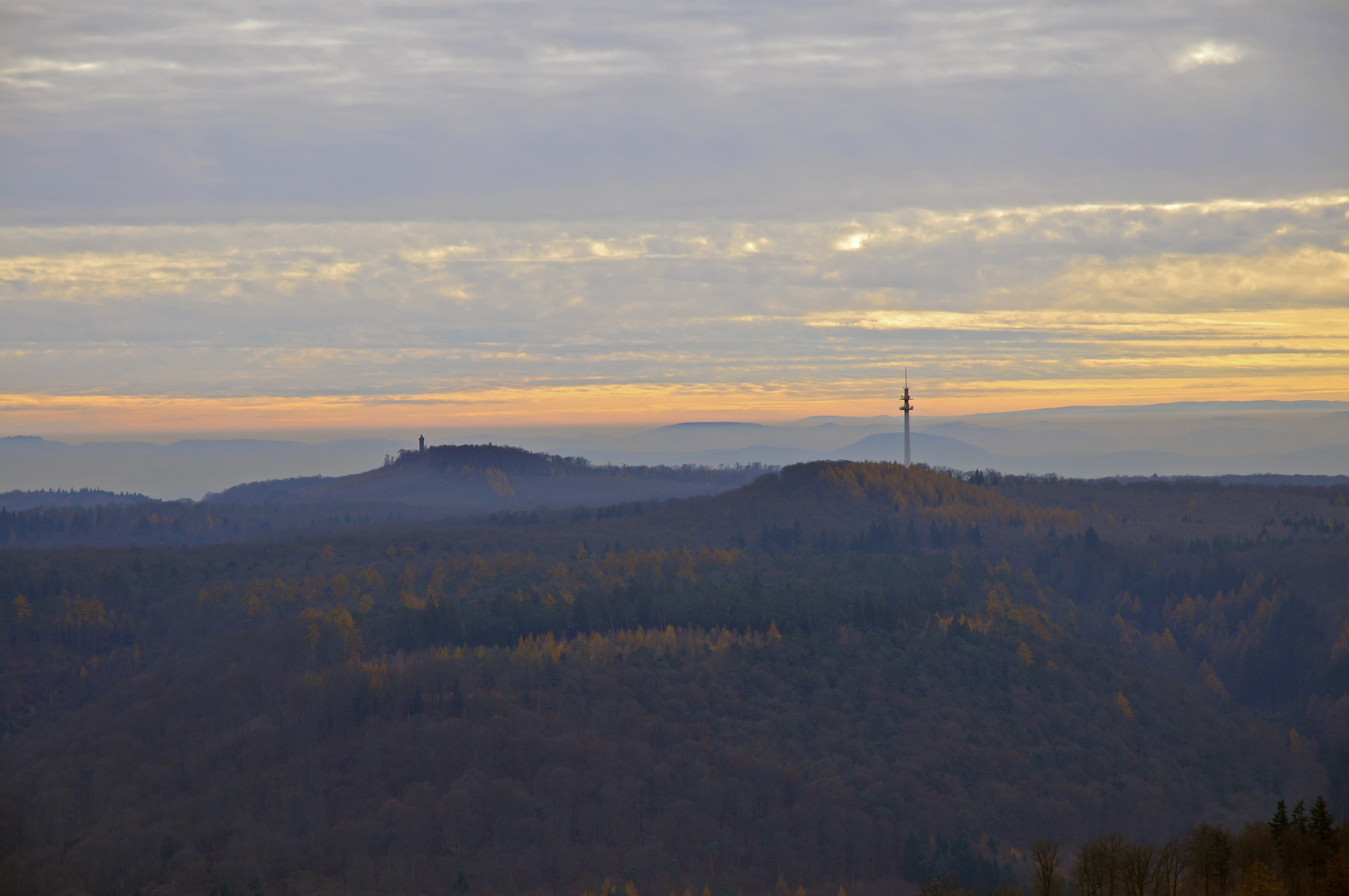 Der Weißenberg mit dem Luitpoldturm im linken Bildbereich, der Hortenkopf mit Fernmeldeturm im rechten Bildbereich.